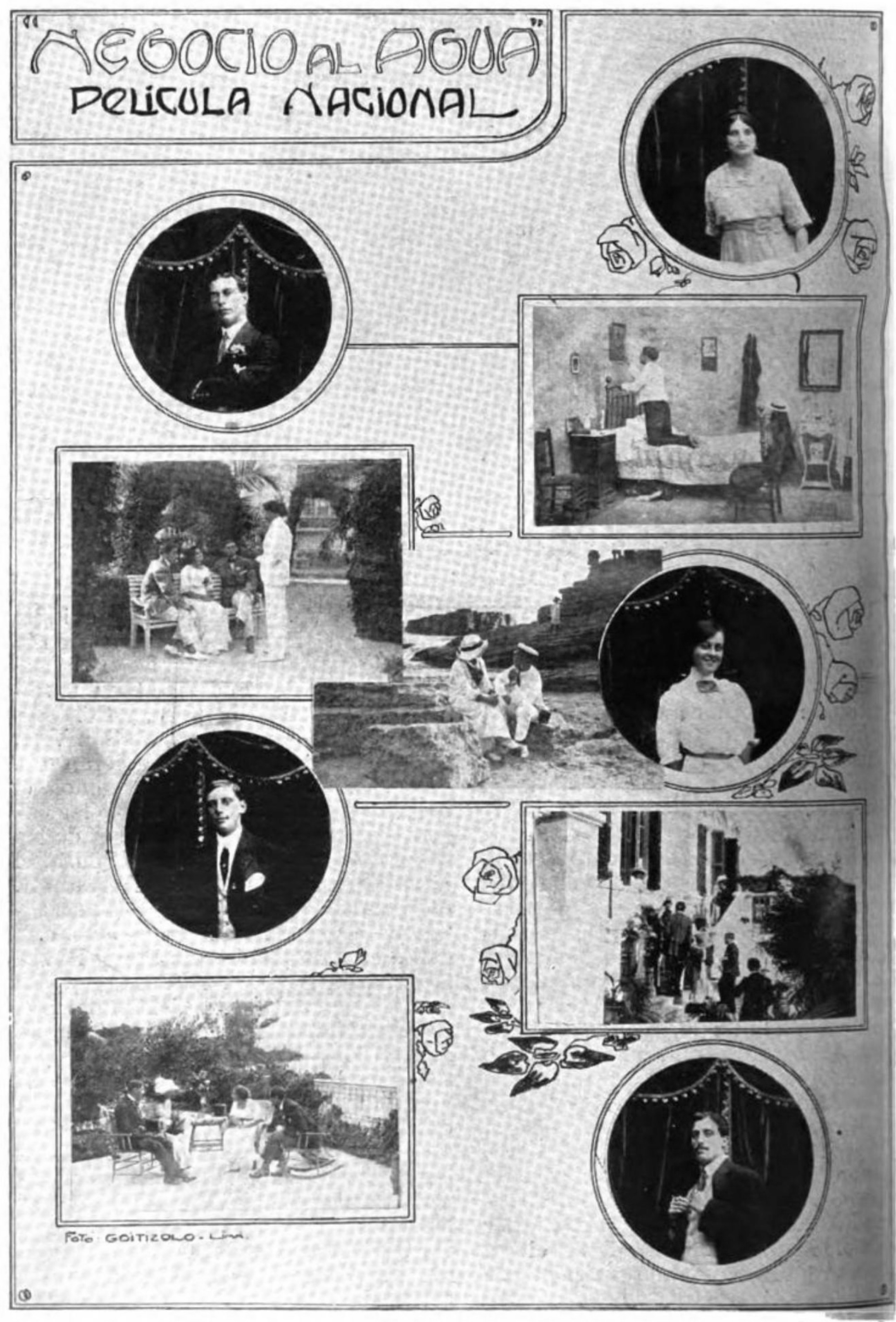 Cartel promocional de la película peruana Negocio al agua (1913).